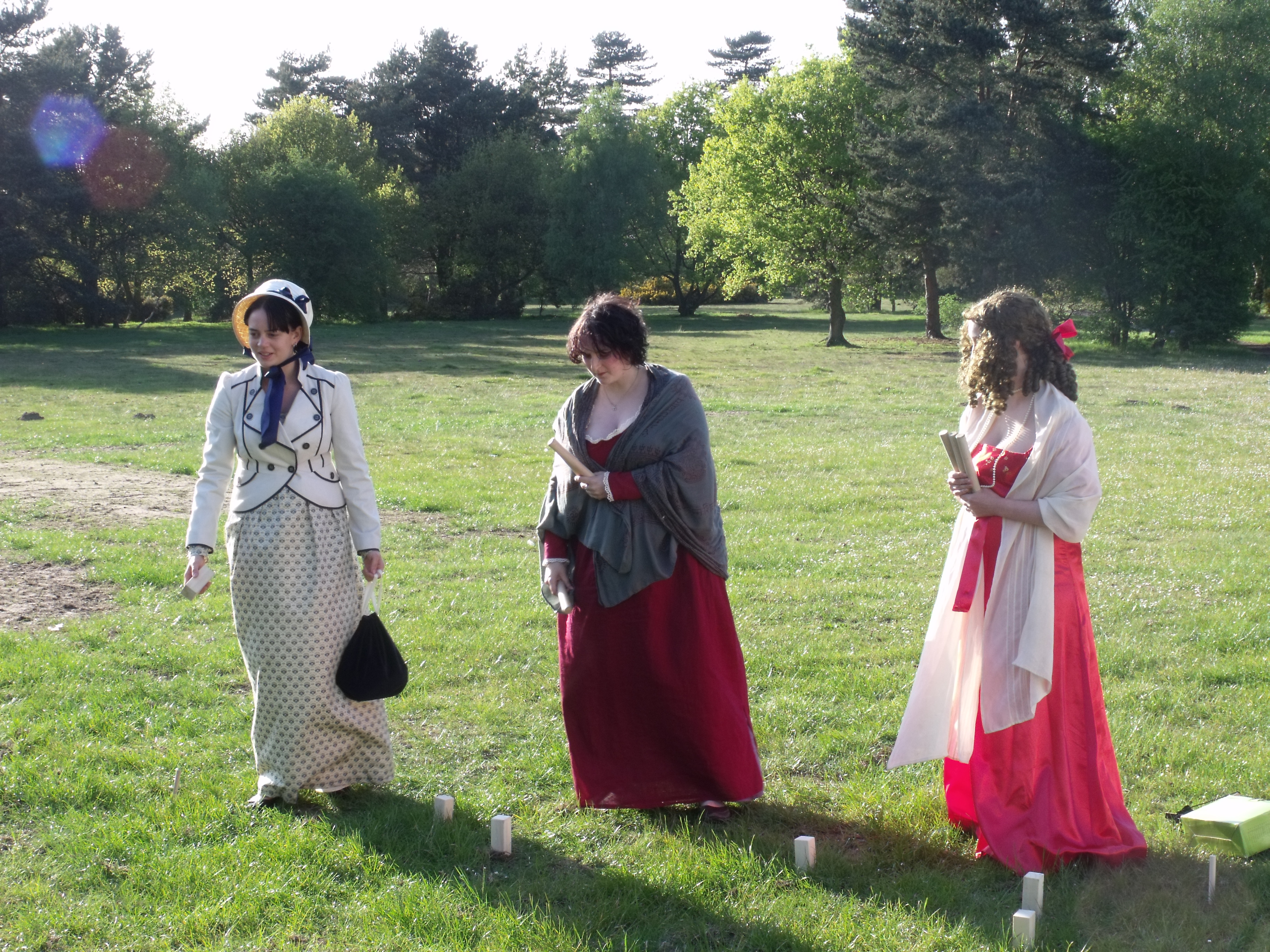 Espousals & Expeditions, the second Masquerades & Massacres event.